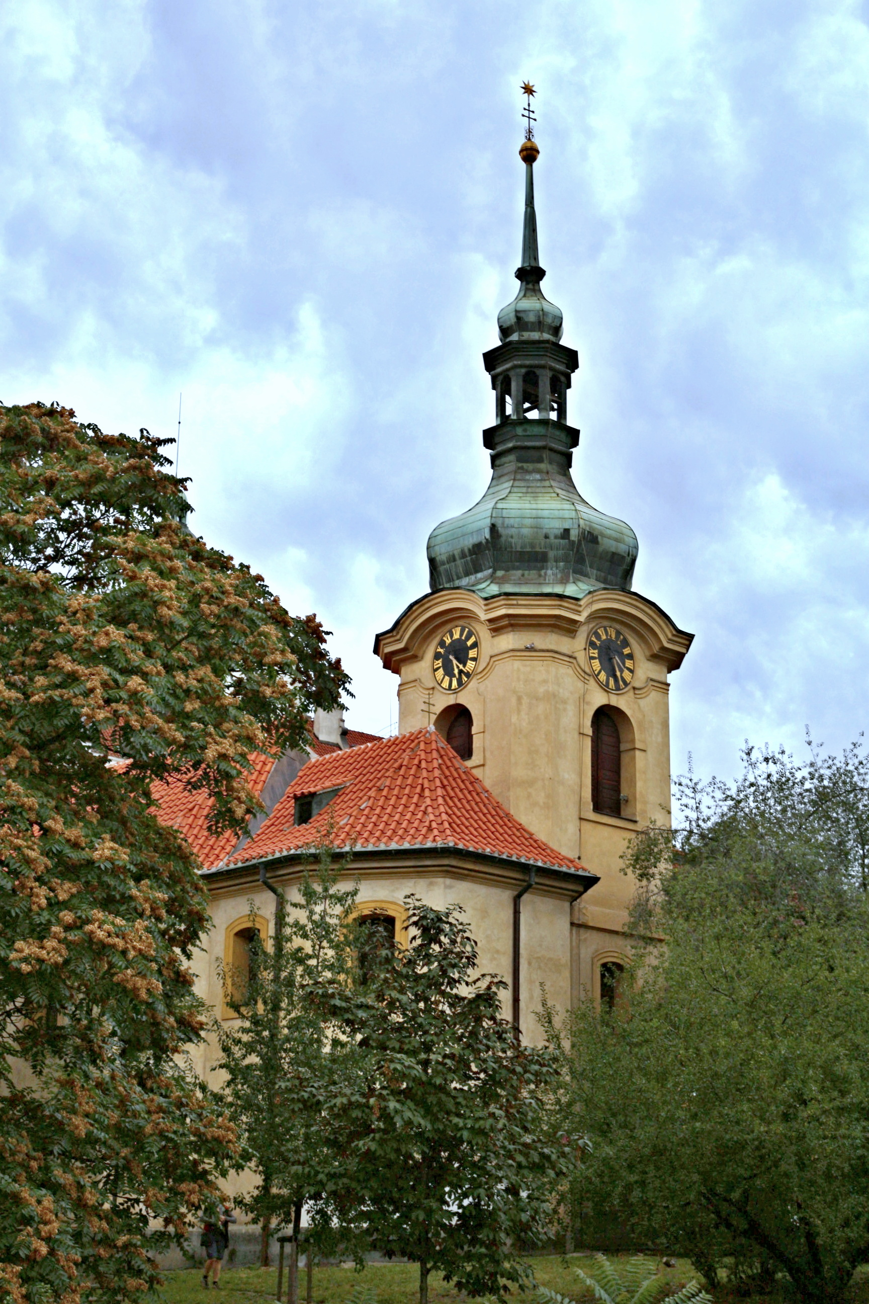 Kostel sv. Mikuláše v Praze 10-Vršovicích